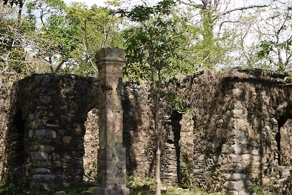 Ruinas Maboro